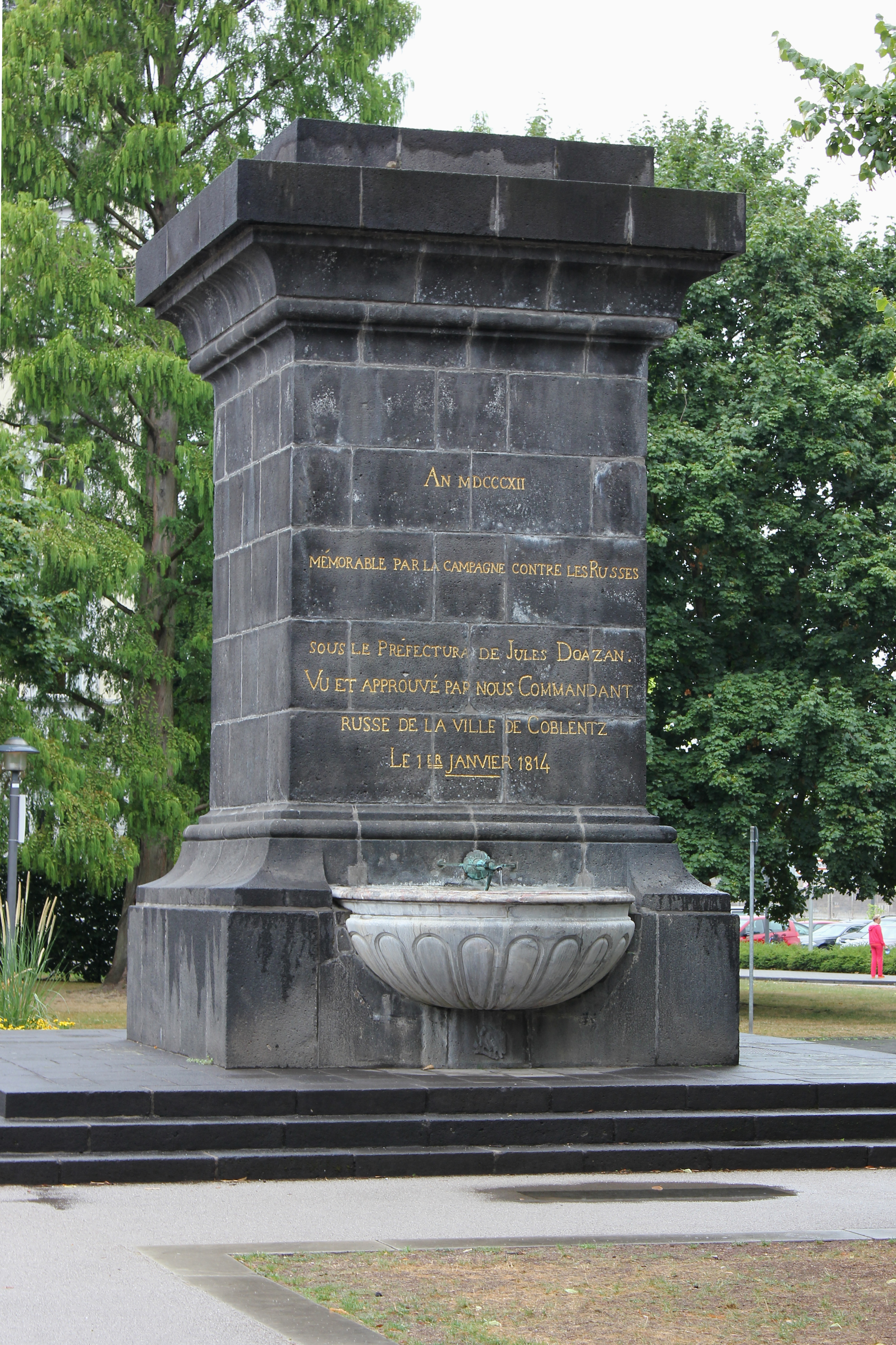 Kastorbrunnen in Koblenz